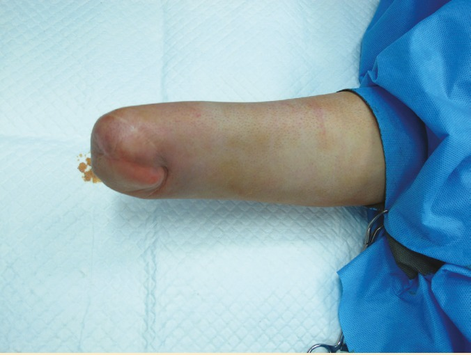 Stumpf des Unterarms vor einer Handtransplantation